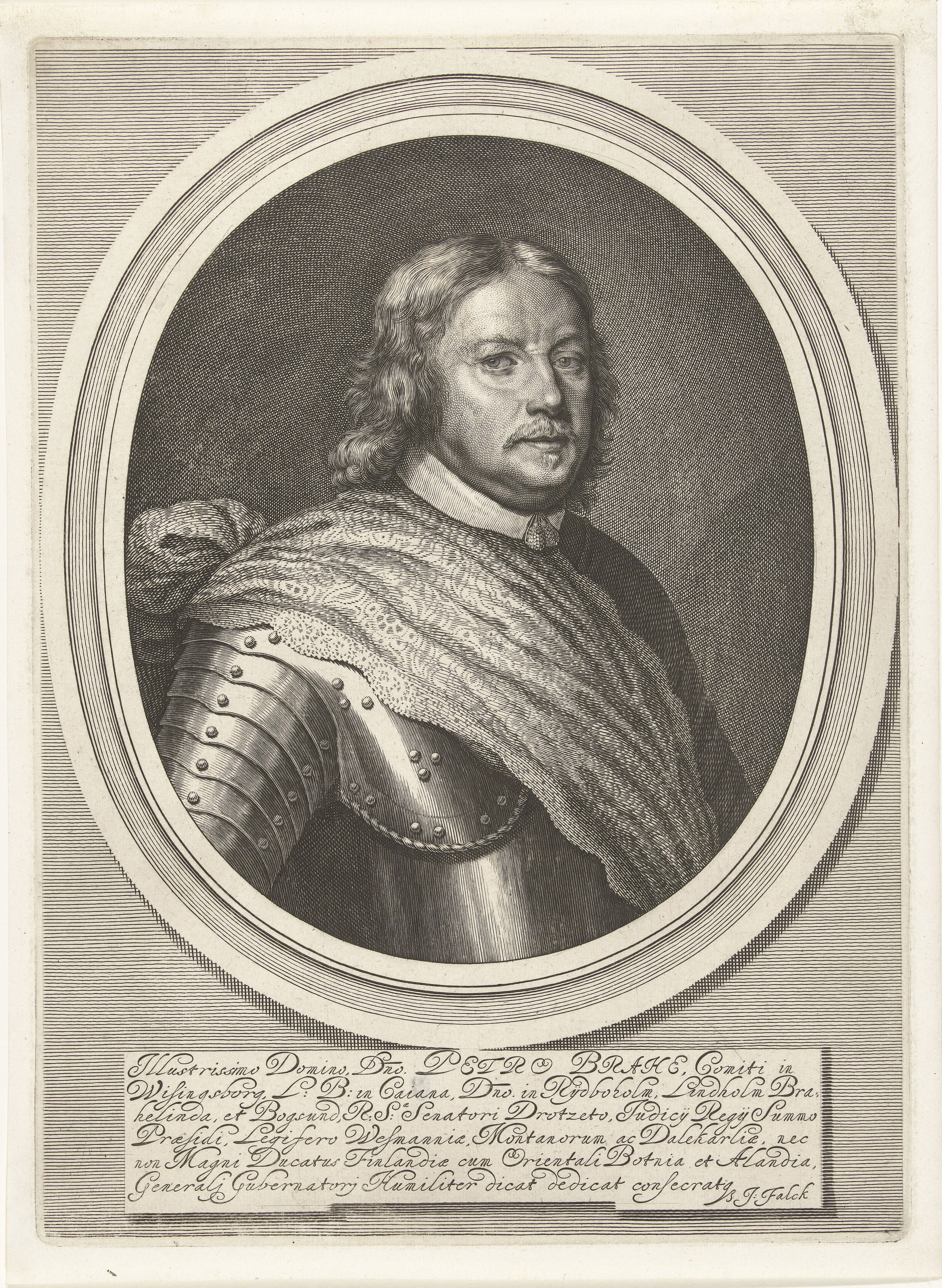 IdentificatieTitel(s): Portret van Peter BraheObjecttype: prent Objectnummer: RP-P-1938-1494Catalogusreferentie: Block 213-1(2)Hollstein Dutch 213Opschriften / Merken: verzamelaarsmerk, verso, gestempeld: Lugt 2228verzamelaarsmerk, verso, gestempeld: Lugt 2760Omschrijving: Portret van de Zweed Peter Brahe, gouverneur van Finland. Met sjerp over zijn harnas, ten halven lijve afgebeeld in ovale omlijsting. Onder de lijst een opschrift in Latijn.VervaardigingVervaardiger: prentmaker: Jeremias Falck (vermeld op object)Plaats vervaardiging: AmsterdamDatering: 1639 - 1677Fysieke kenmerken: gravureMateriaal: papier Techniek: graveren (drukprocedé)Afmetingen: plaatrand: h 318 mm × b 232 mmOnderwerpWie: Peter BraheVerwerving en rechtenCredit line: Aankoop uit het F.G. Waller-FondsVerwerving: aankoop 1938Copyright: Publiek domein